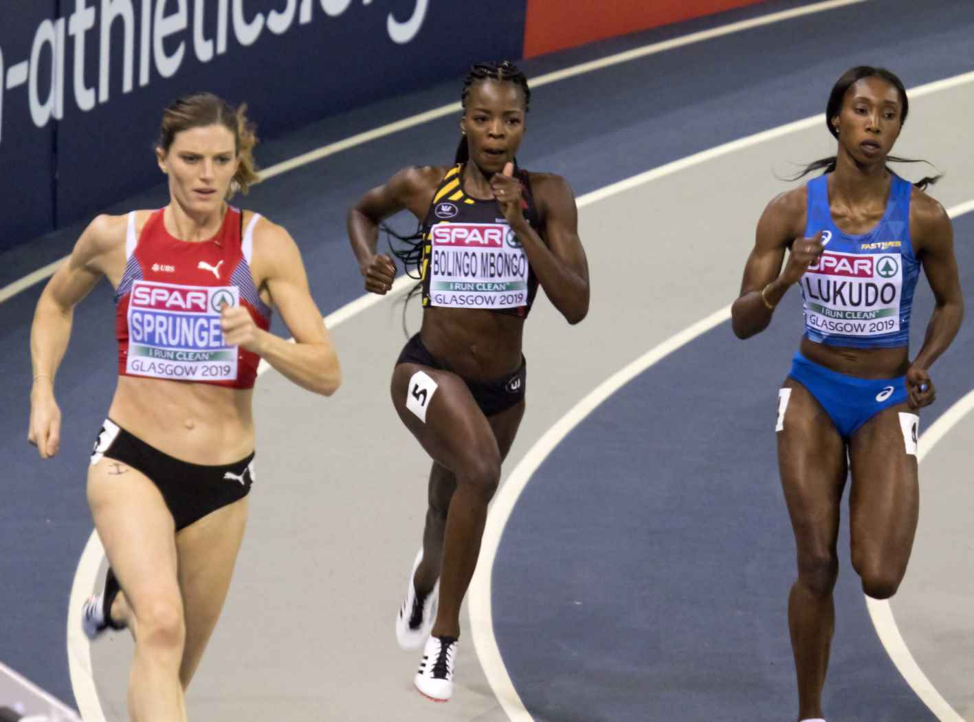 EKI20460 finale 400m dames bolingo sprunger lukudo